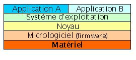 Couches de logiciels d'un ordinateur